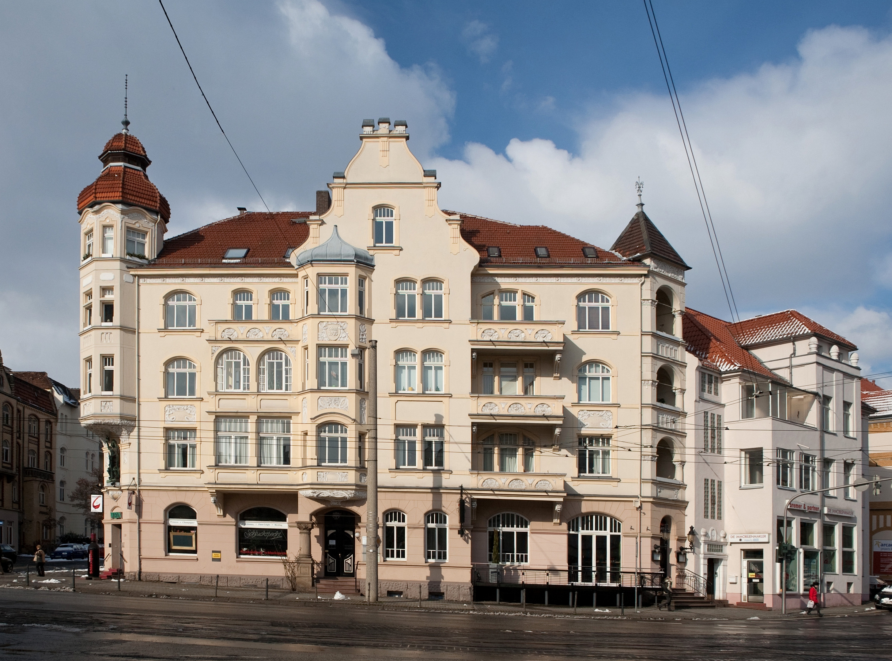 Jugendstilhaus im Kasseler Vorderen Westen